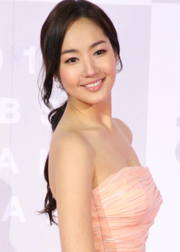 2010년 12월 31일 열린 2010 KBS 연기대상에서의 박민영.